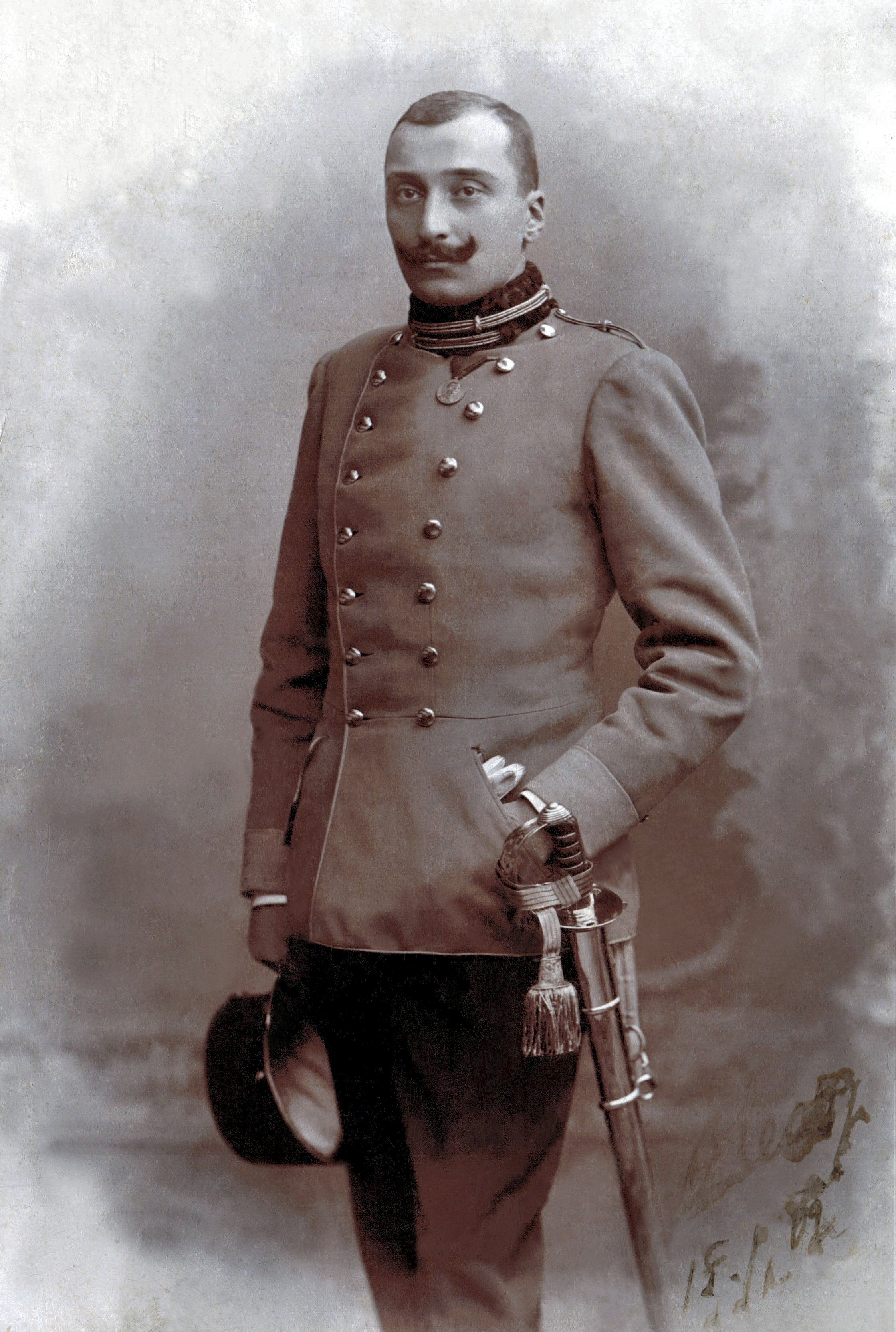 Alexander Graf (1918) Wassilko von Serecki, 15.11.1909